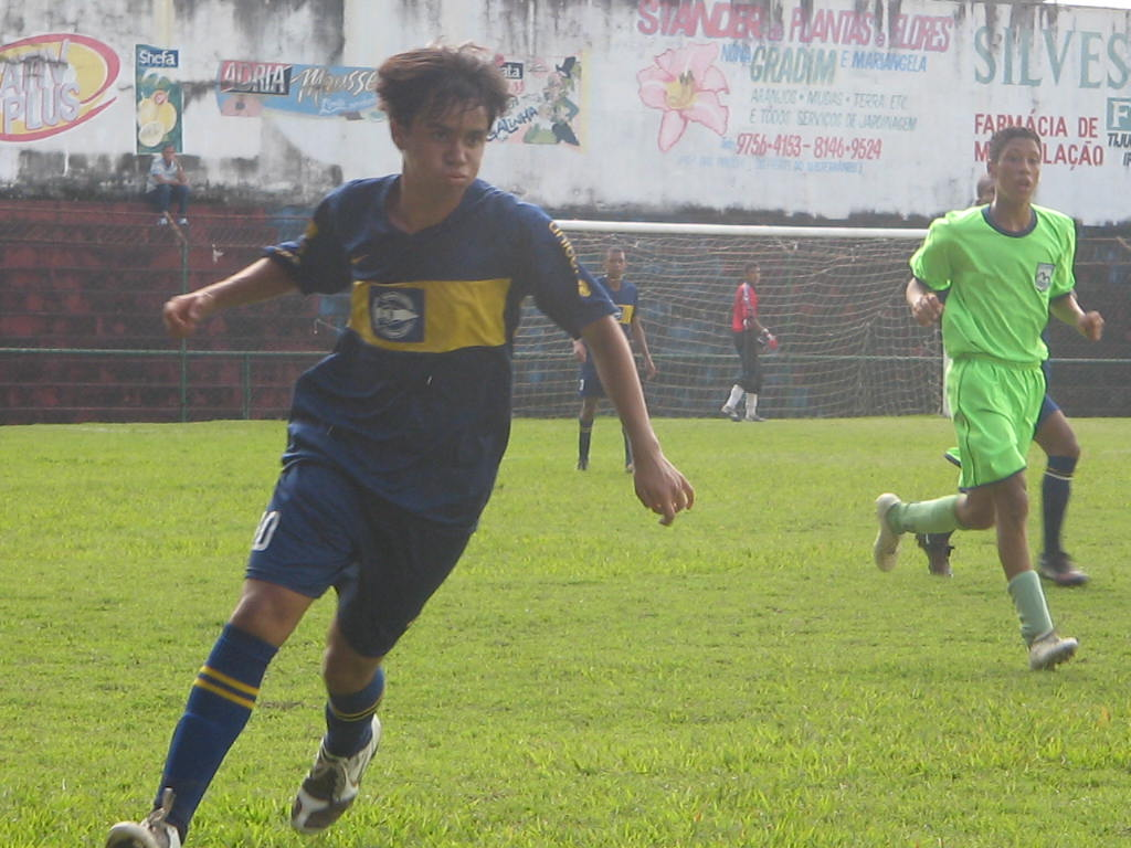 Atleta juvenil do Duquecaxiense Futebol Clube em confronto contra o Rio de Janeiro, em 2009. Foto de Paulo Roberto Rodrigues.